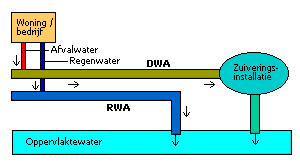 Eigen creatie